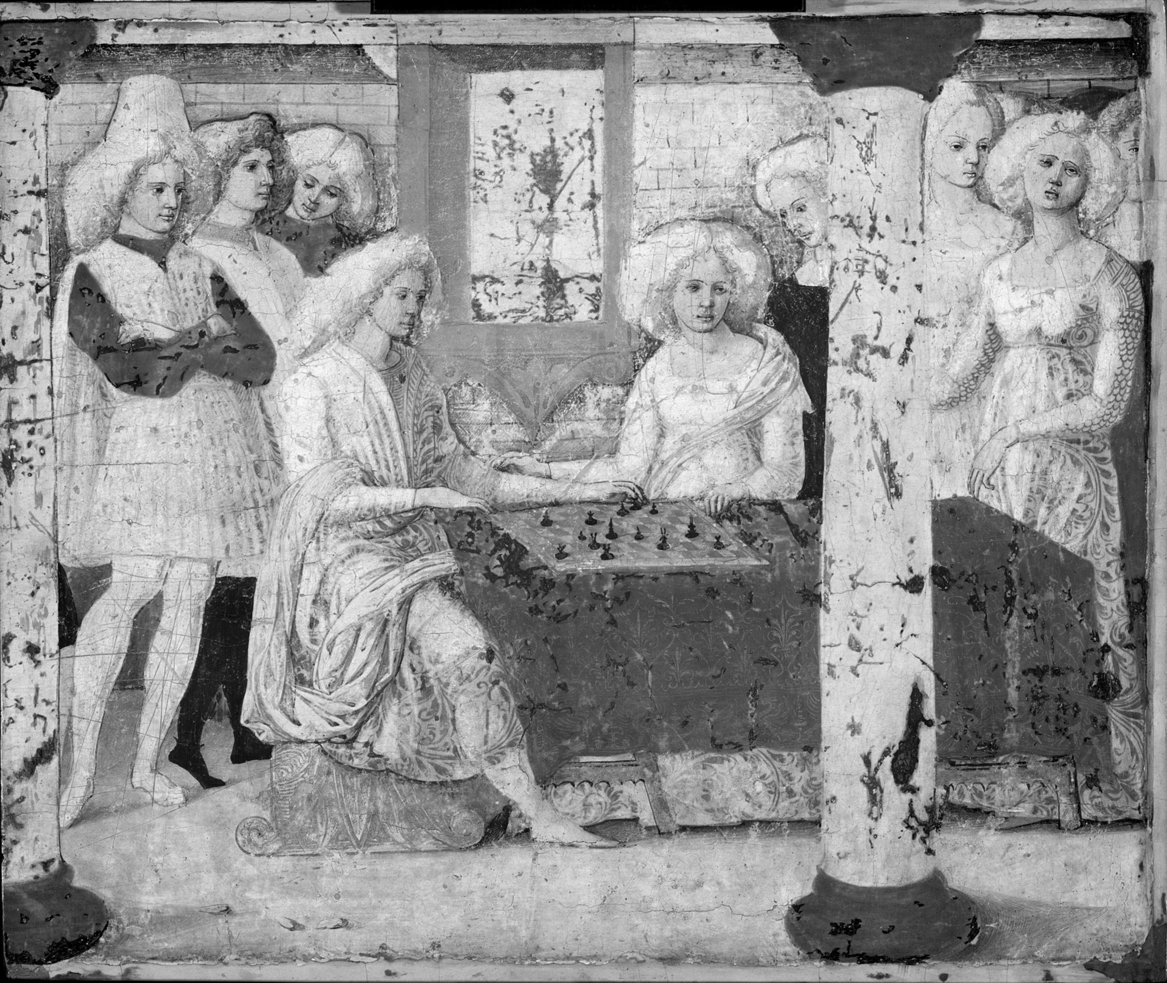 Painting, cassone panel; Paintings